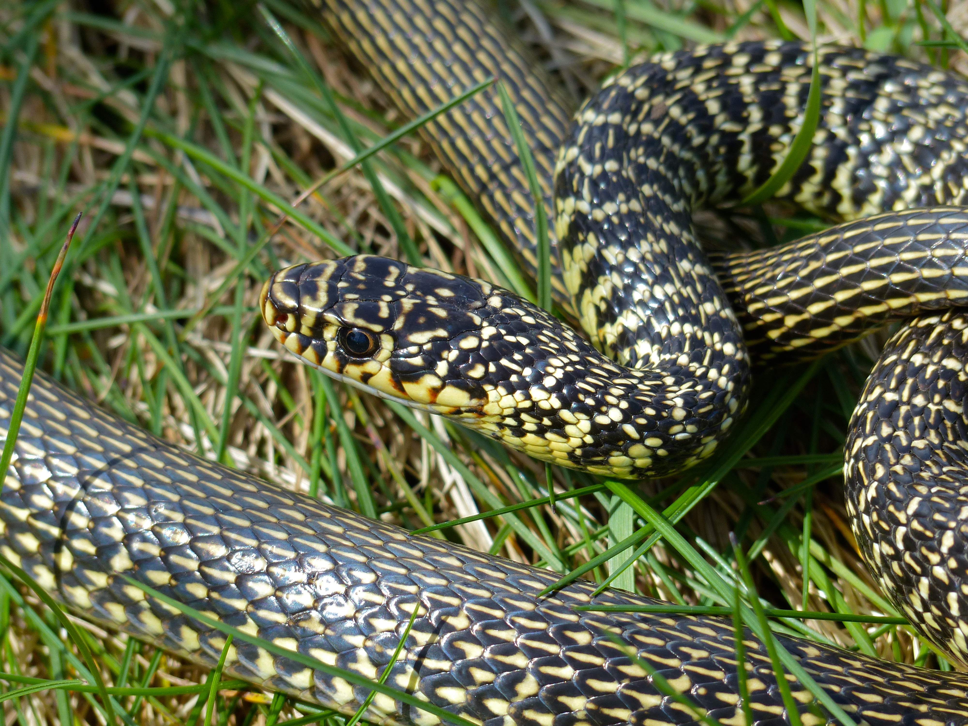 Les Rives, Hérault, FRANCE